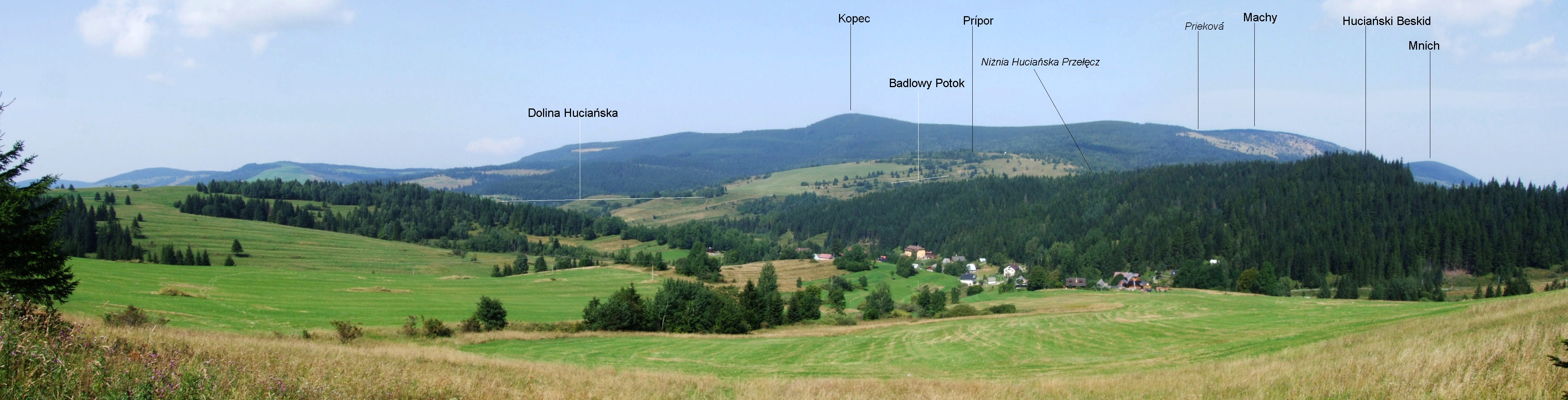 Widok z parkingu przy Wyżniej Huciańskiej Przełęczy